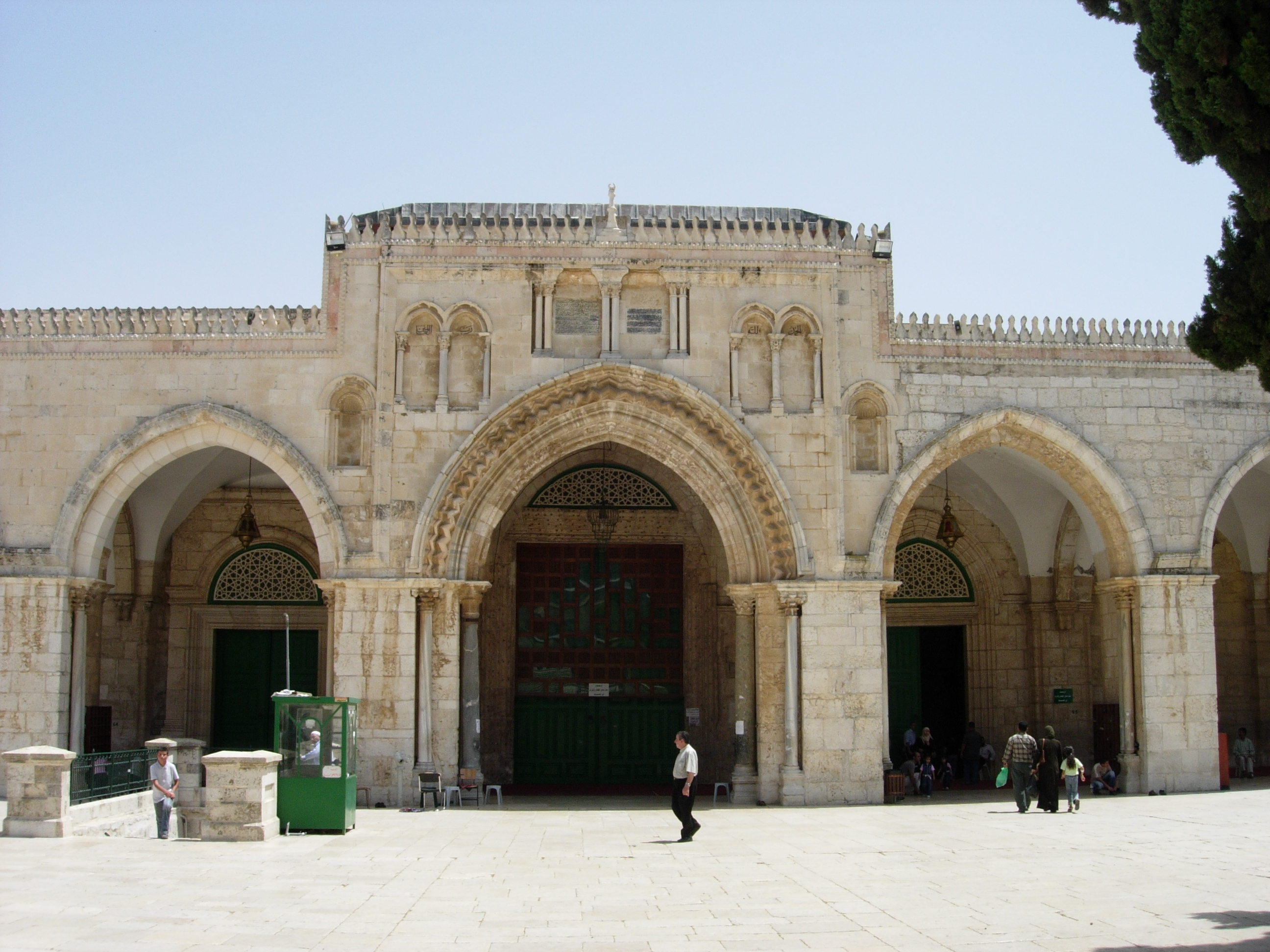 Al-Aqsa Mosque, Jerusalem, Israel.